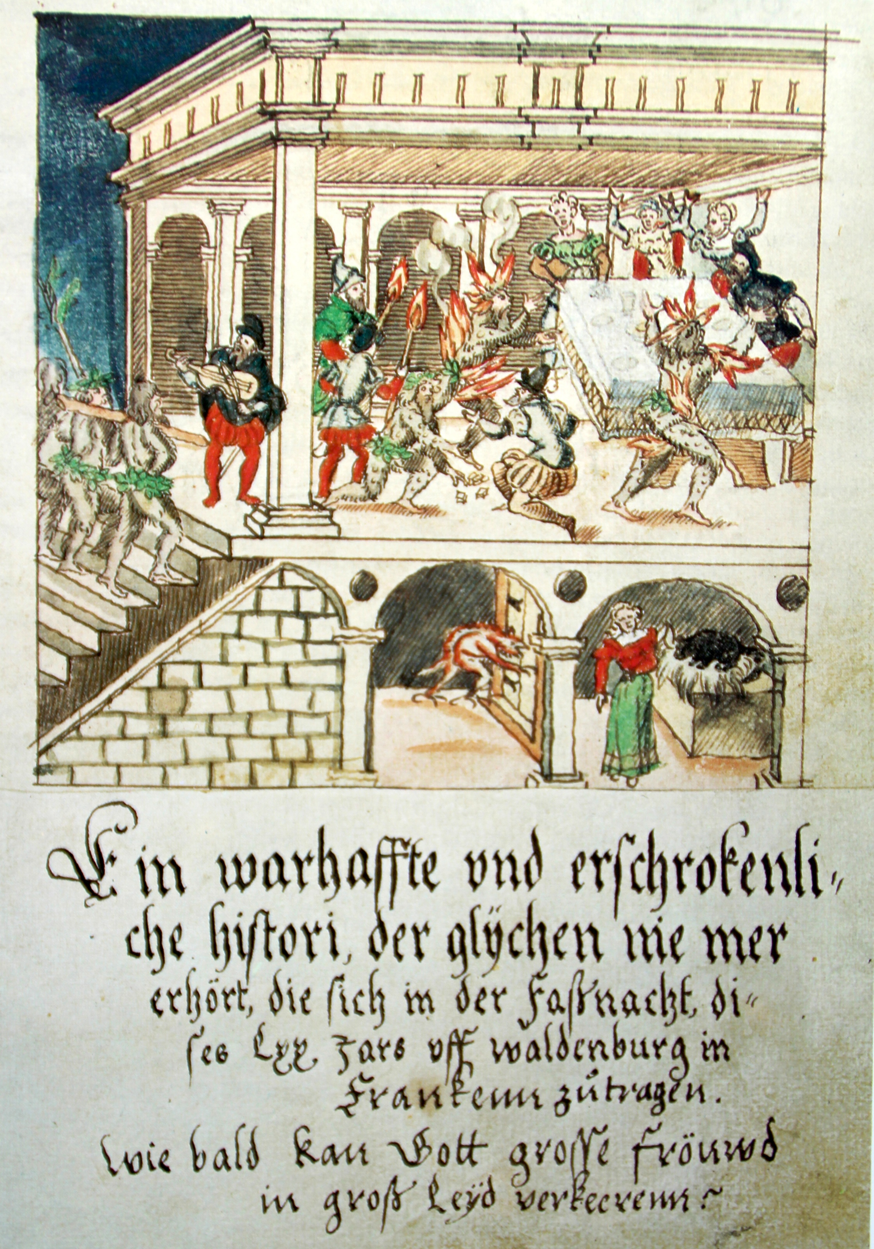 Wickiana Die Grafen Hohenlohe und Waldenburg kommen in der Fasnacht 1570 durch ein Missgeschick ums Leben